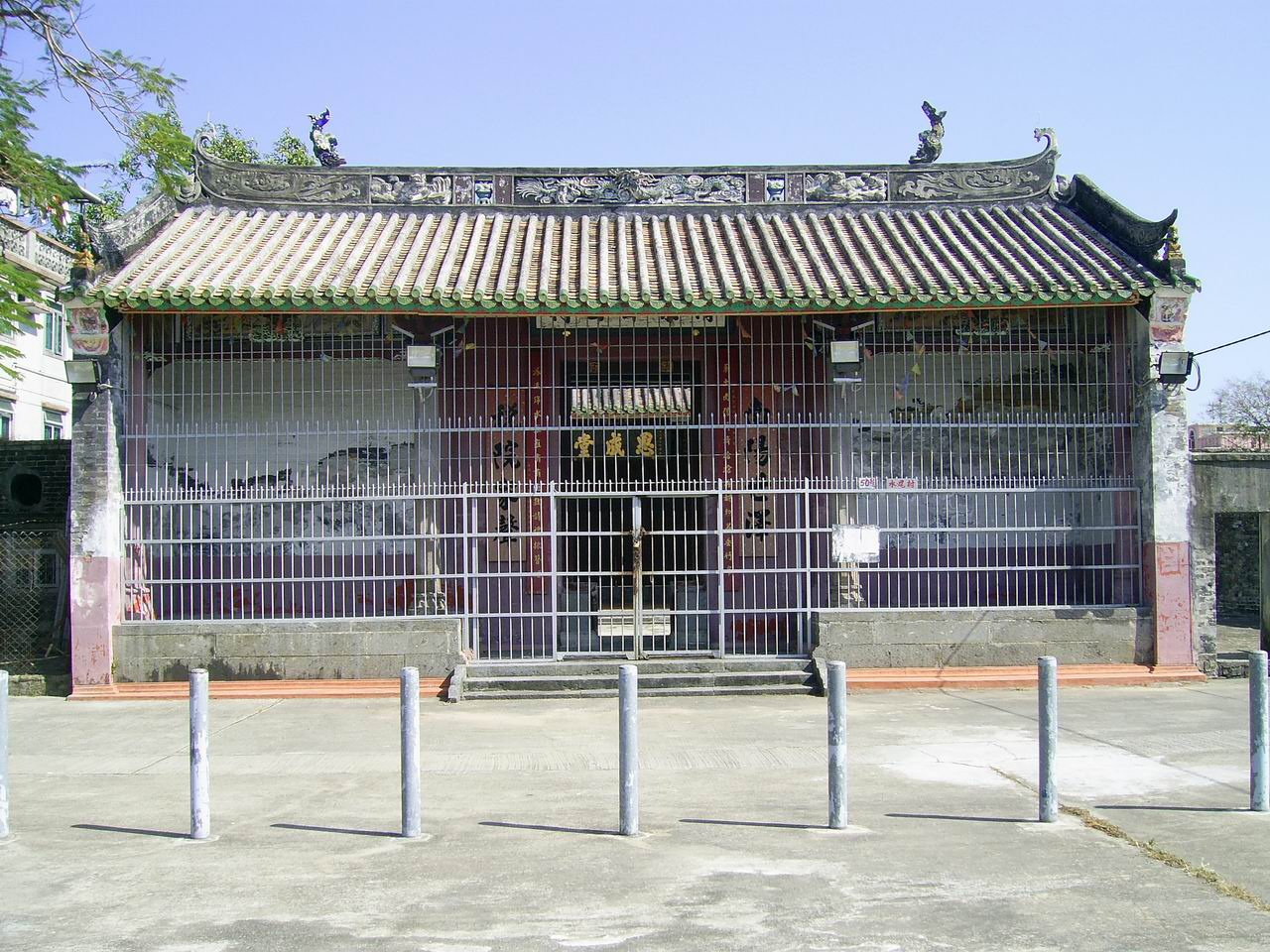 中文（香港）: 清樂鄧公祠